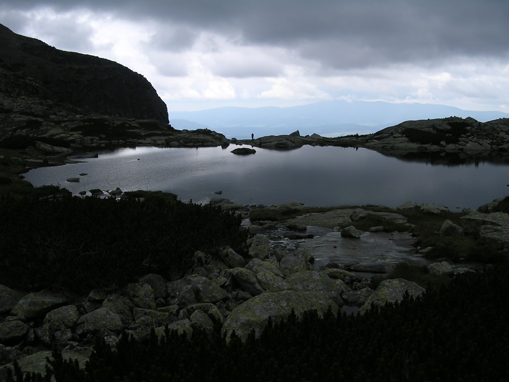 Pleso nad Skokom